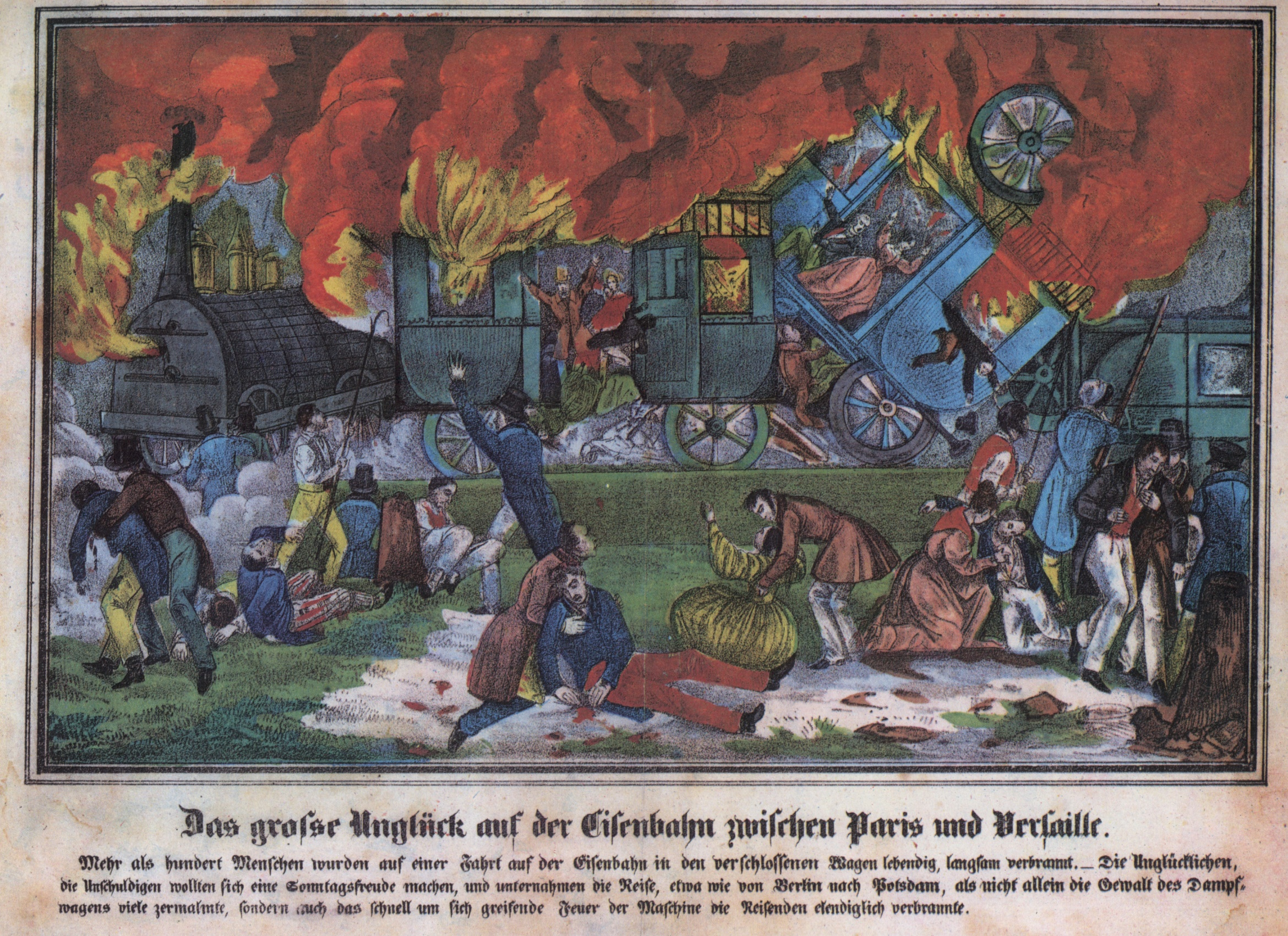 Neuruppiner Bilderbogen Nr. 1493: Das große Unglück auf der Eisenbahn zwischen Paris und Versailles